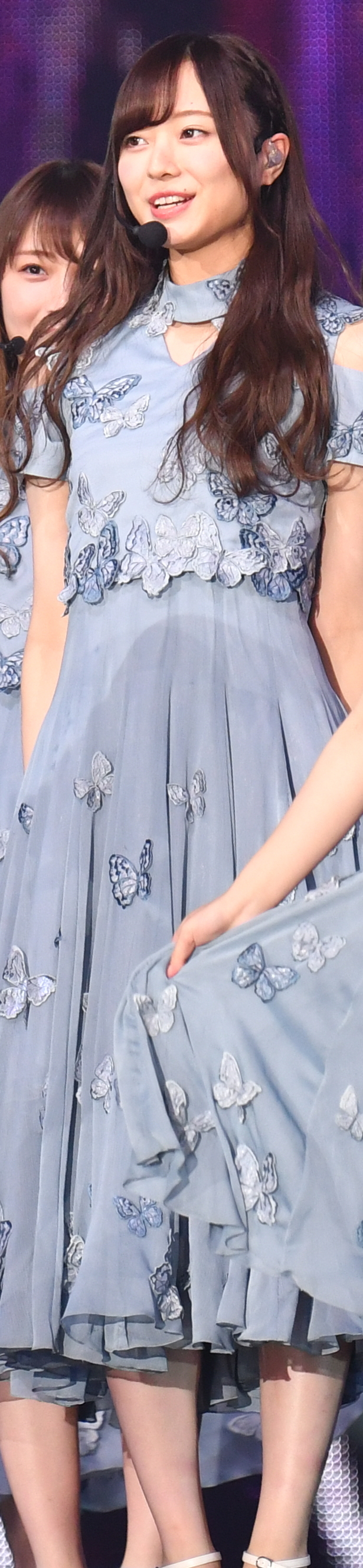 2019.01.26「第14回 KKBOX MUSIC AWARDS in Taiwan」乃木坂46 @台北小巨蛋